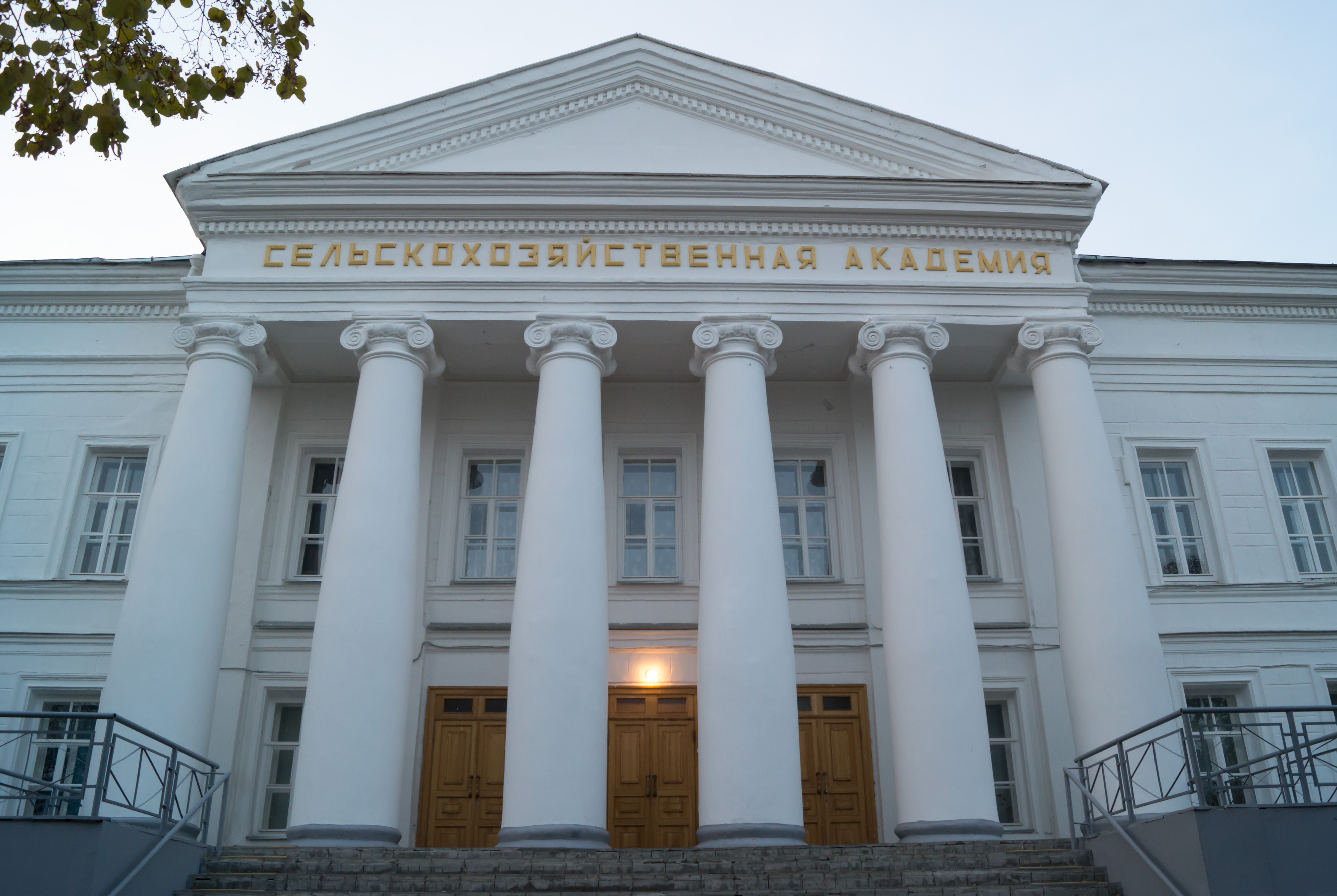 Правление губернское (Присутственные места) (Ульяновская область, Ульяновск, Новый Венец бульв., 1)